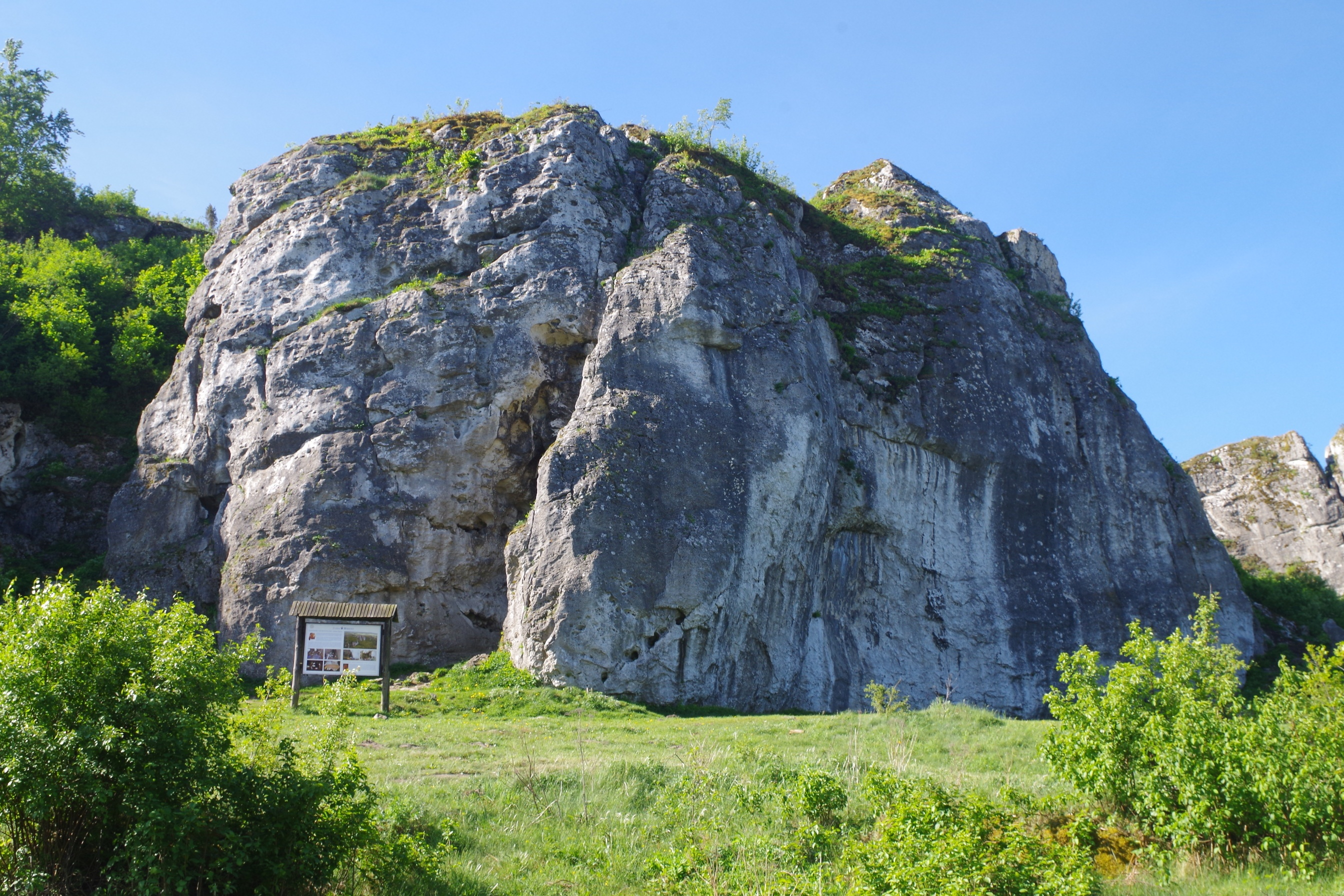 Mirowskie Skały